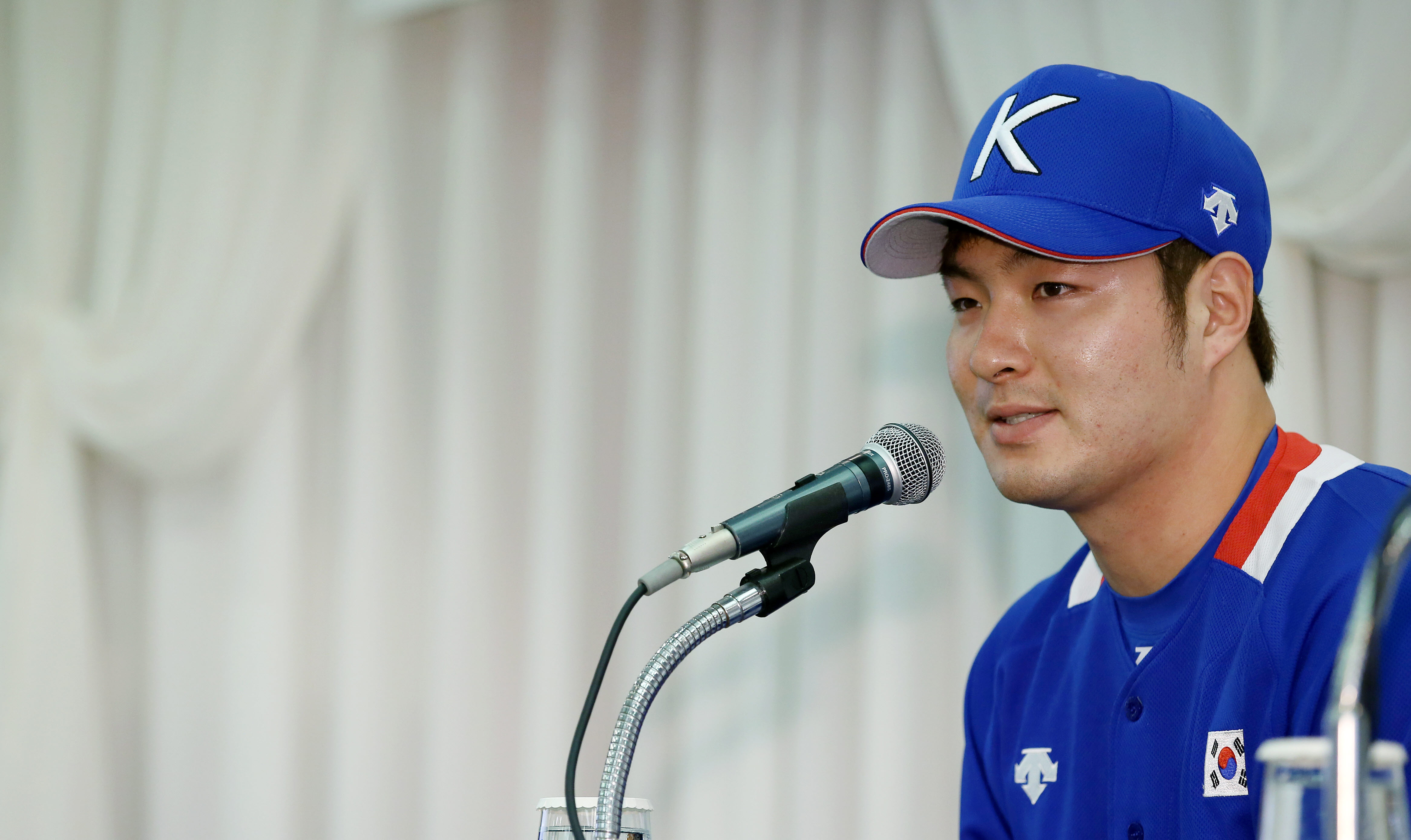 2014년 아시안 게임 대한민국 야구 국가대표팀 박병호